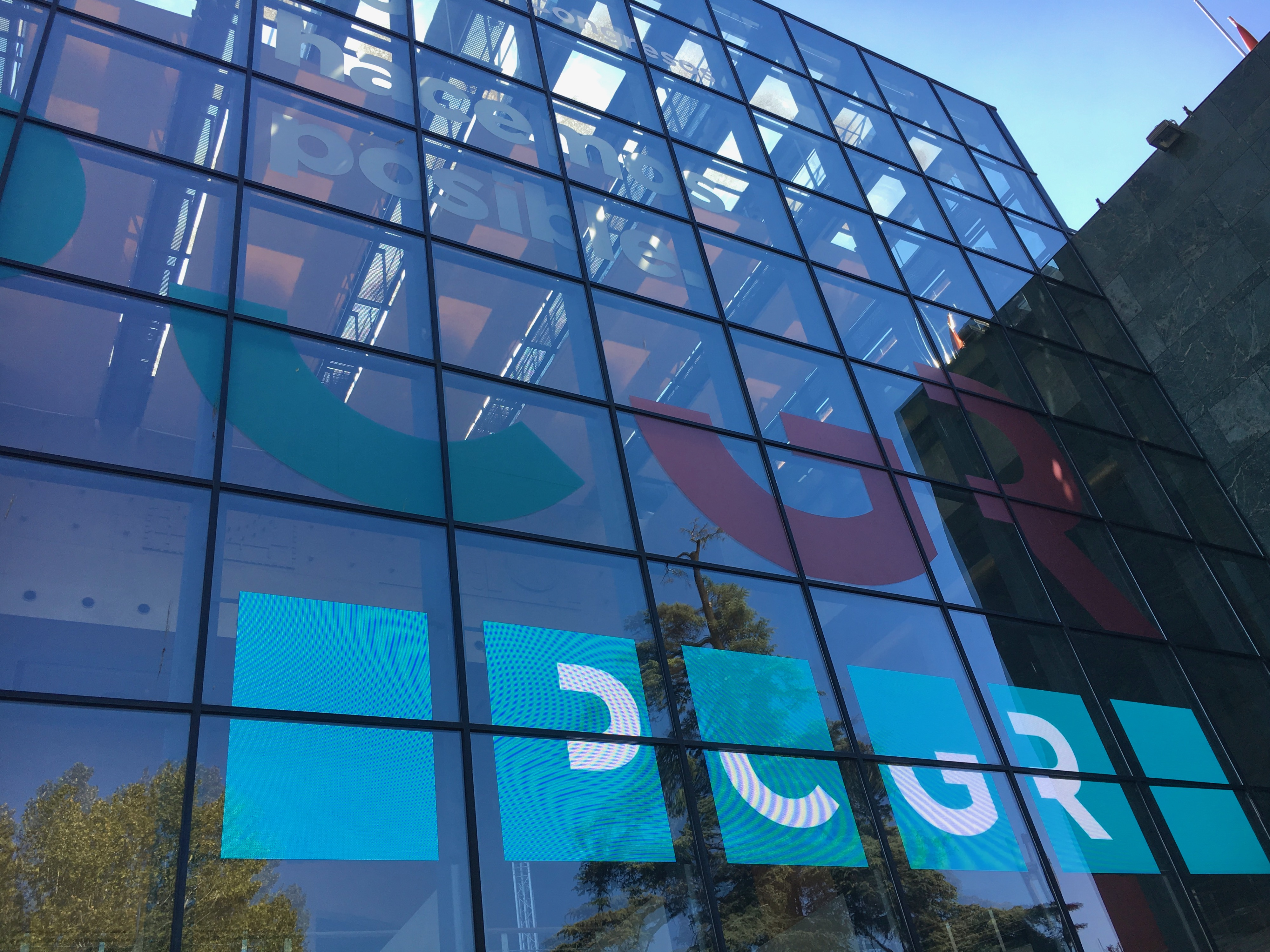 Fachada principal del Palacio de Congresos de Granada